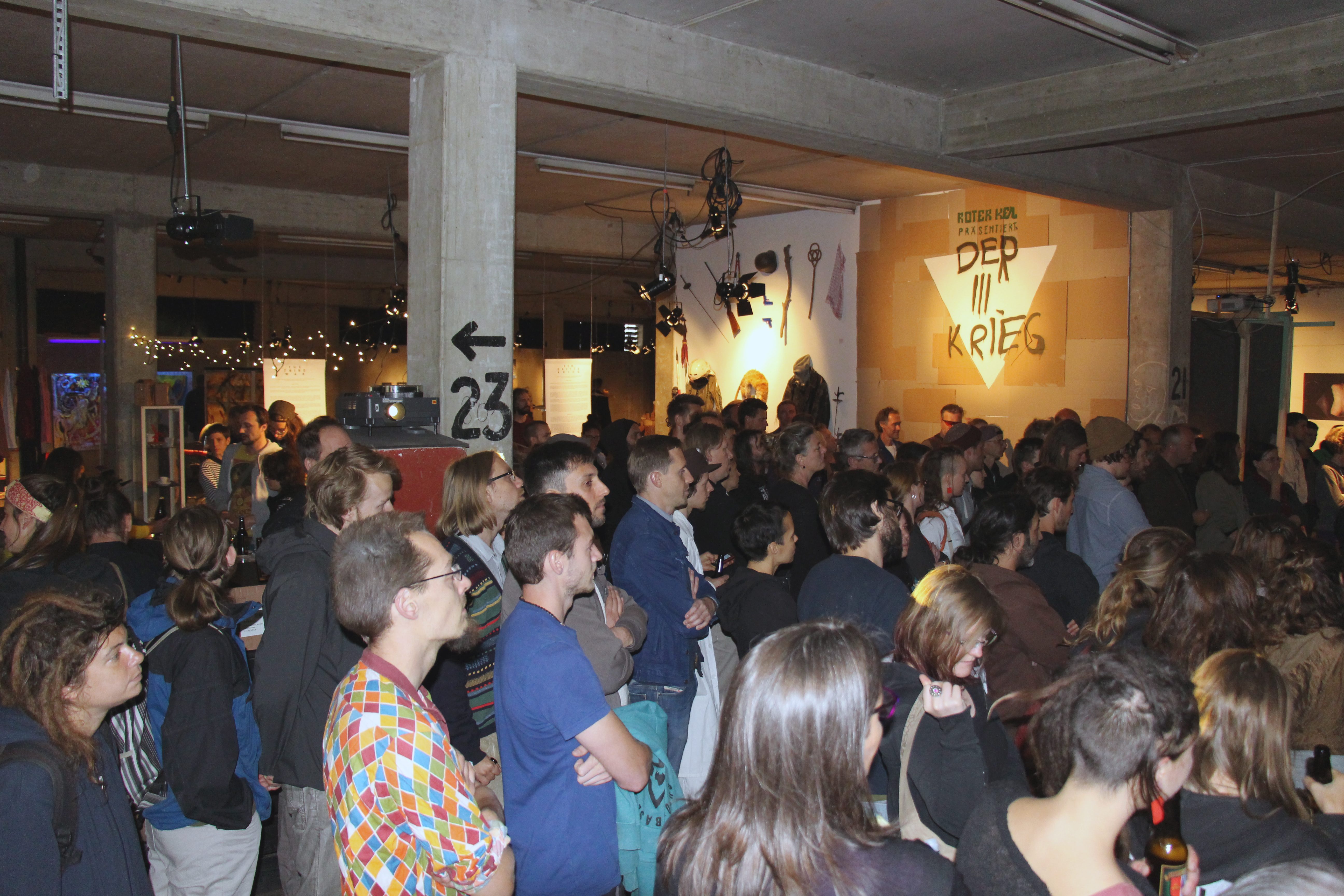 Eröffnungszeremonie bei der Ausstellung mit dem Titel "Der 3. Krieg" des Kunstverein Roter Keil